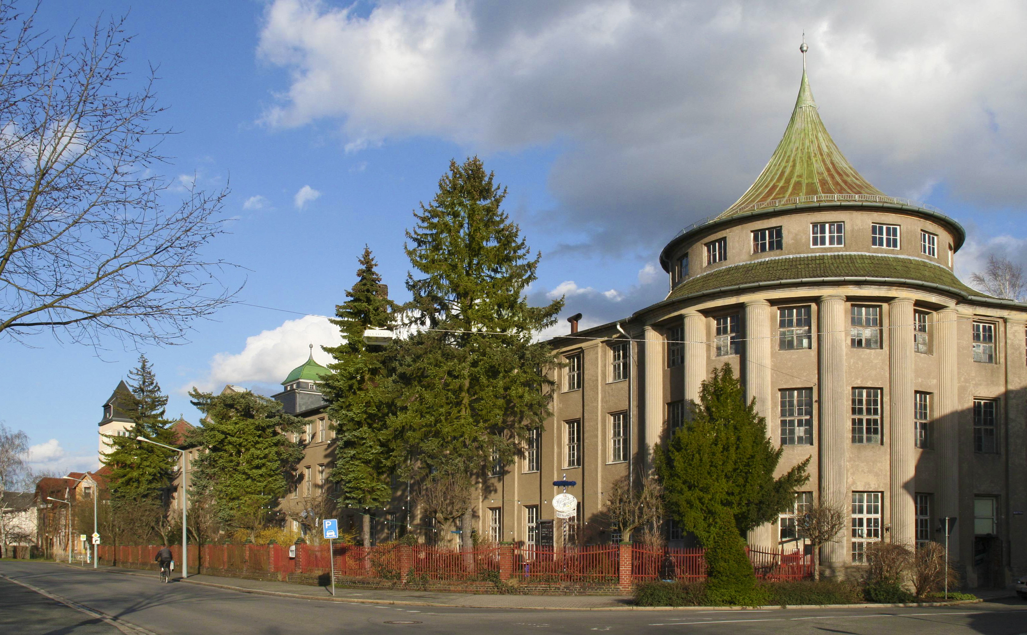 Ehemaliges Werk 1 von Max Oscar Arnold bzw. von Hausser in der Bahnhofstr. in Neustadt bei Coburg